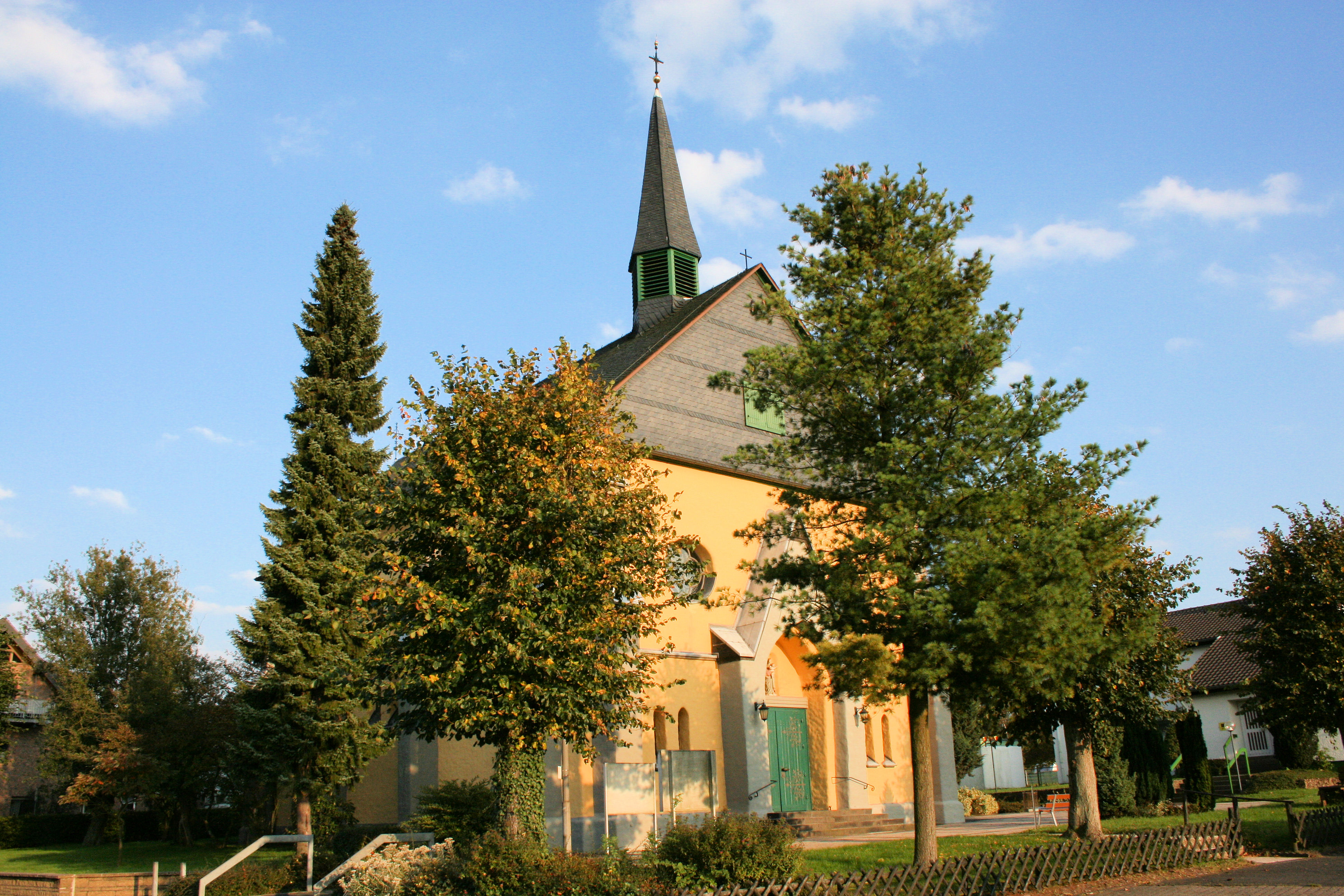 Kirche in Limbach, Ortsgemeinde Asbach